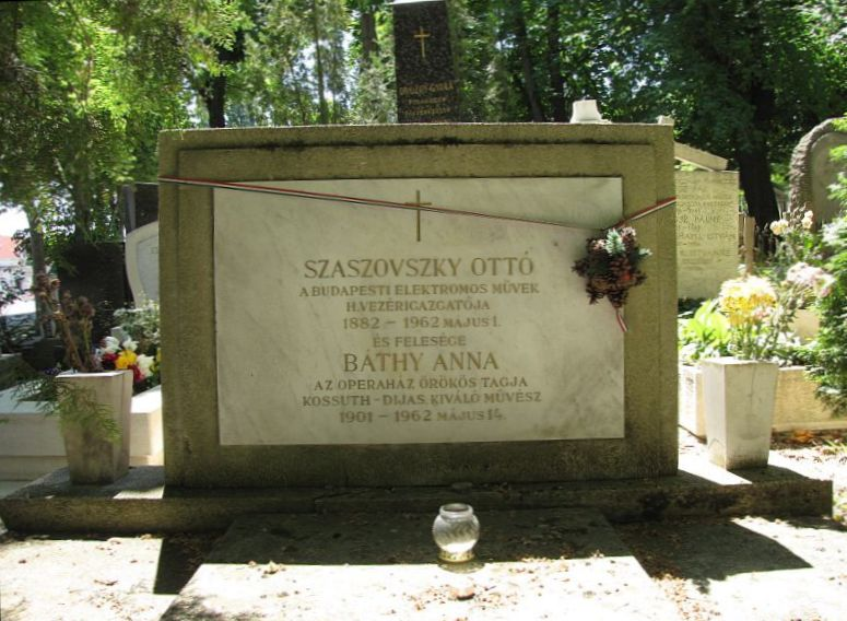 Báthy Anna (Beregszász, 1901. június 13. – Budapest, 1962. május 14.) opera-énekesnő (szoprán) és férje Szaszovszky Ottó (1882-1962) a Budapesti Elektromos Művek h. vezérigazgatójának sírja Budapesten. Farkasréti temető: 1-1-415/416.